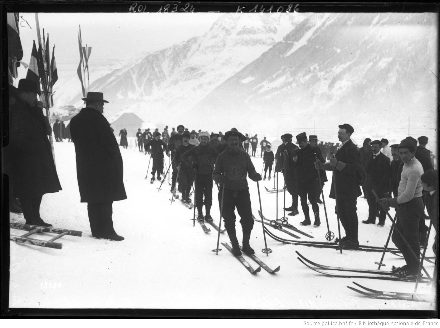 Chamonix, [3] février 1912, départ [de la] course de fond pour guides, en tête le guide Ravanel [ski, VIe concours international de ski du Club Alpin Français] : [photographie de presse] / [Agence Rol]